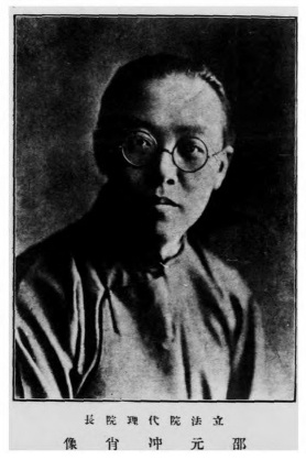 中文（中国大陆）: 民國二十一年立法院四周年紀念刊